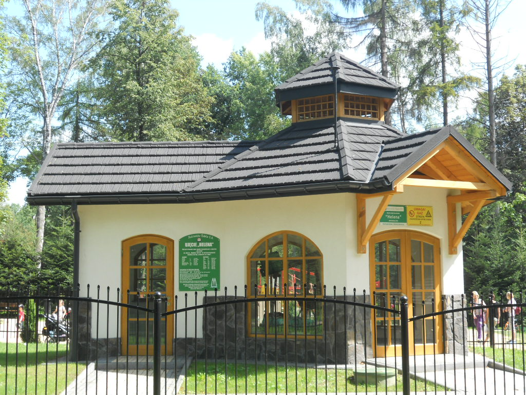 Odwiert źródła "Helena" - wody spływającej po tężni.